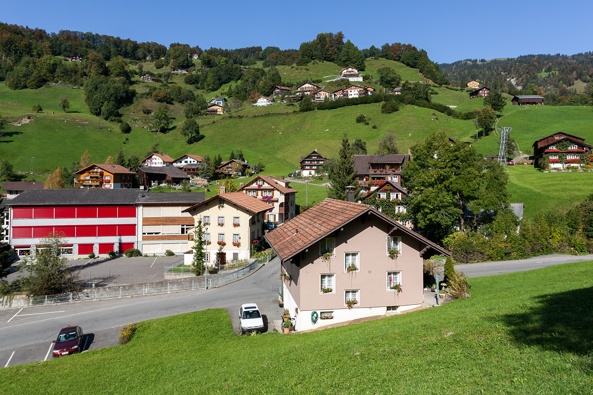 Blick zum Schulhaus von Illgau (SZ)